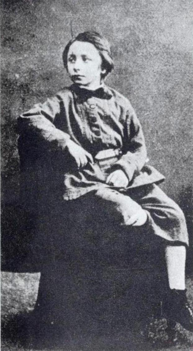 Photographie de Paul Deschanel durant son enfance.